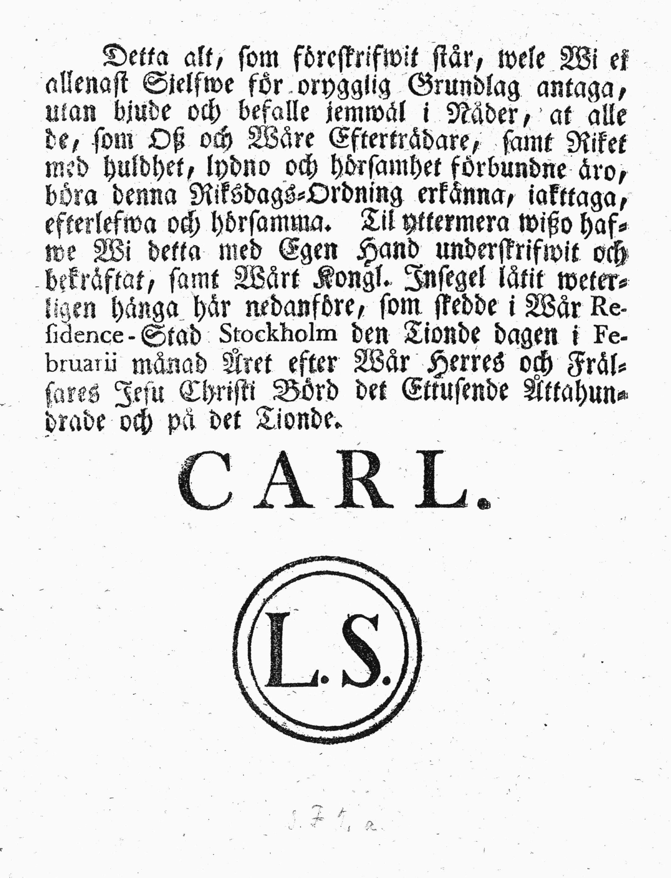 Sista bilden av 1810 års riksdagsordning med kungens signatur